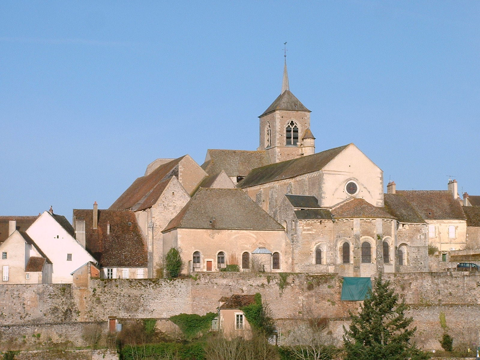 Collégiale Saint-Lazare (Avallon, Yonne, Bourgogne-Franche-Comté, France) vue depuis le quartier des Chaumes.